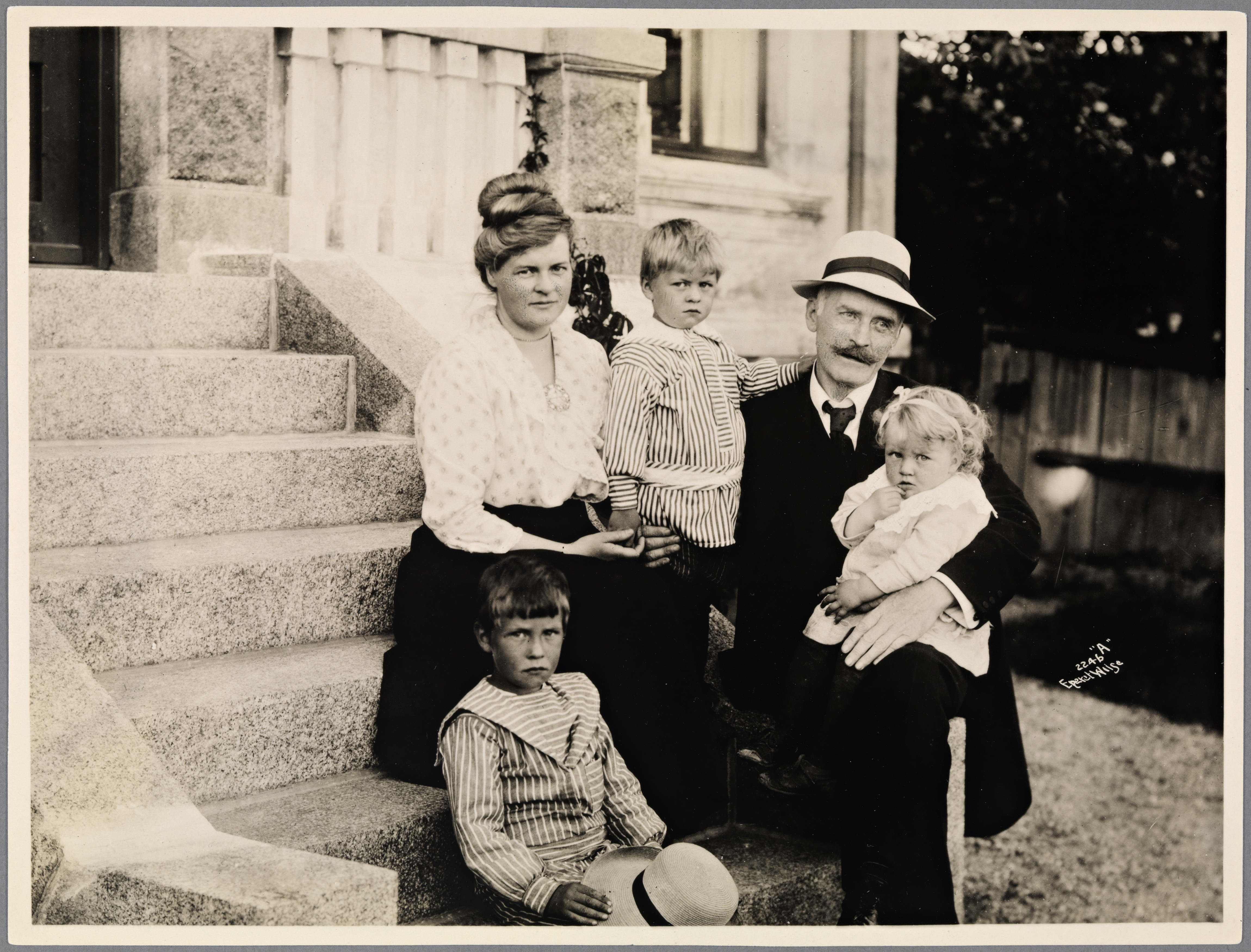 Beskrivelse / Description: Familien på trappa til villaen "Havgløtt". Fra venstre: Tore Hamsun (foran), Marie Hamsun, Arild Hamsun, Knut Hamsun og Ellinor Hamsun (sittende på fanget til sin far). Bildet stammer fra Gyldendals historiske portrettarkiv. Dato / Date: 1917 Sted / Place: Vestfold, Larvik, "Havgløtt" Fotograf / Photographer: Anders Beer Wilse (1865-1949) Digital kopi av original / Digital copy of original: s/h papirpositiv Eier / Owner Institution: Nasjonalbiblioteket / National Library of Norway Bildesignatur / Image Number: bldsa_HA0165